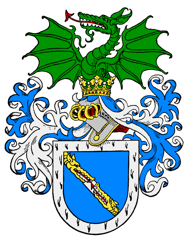 Wappen derer von Hoyos